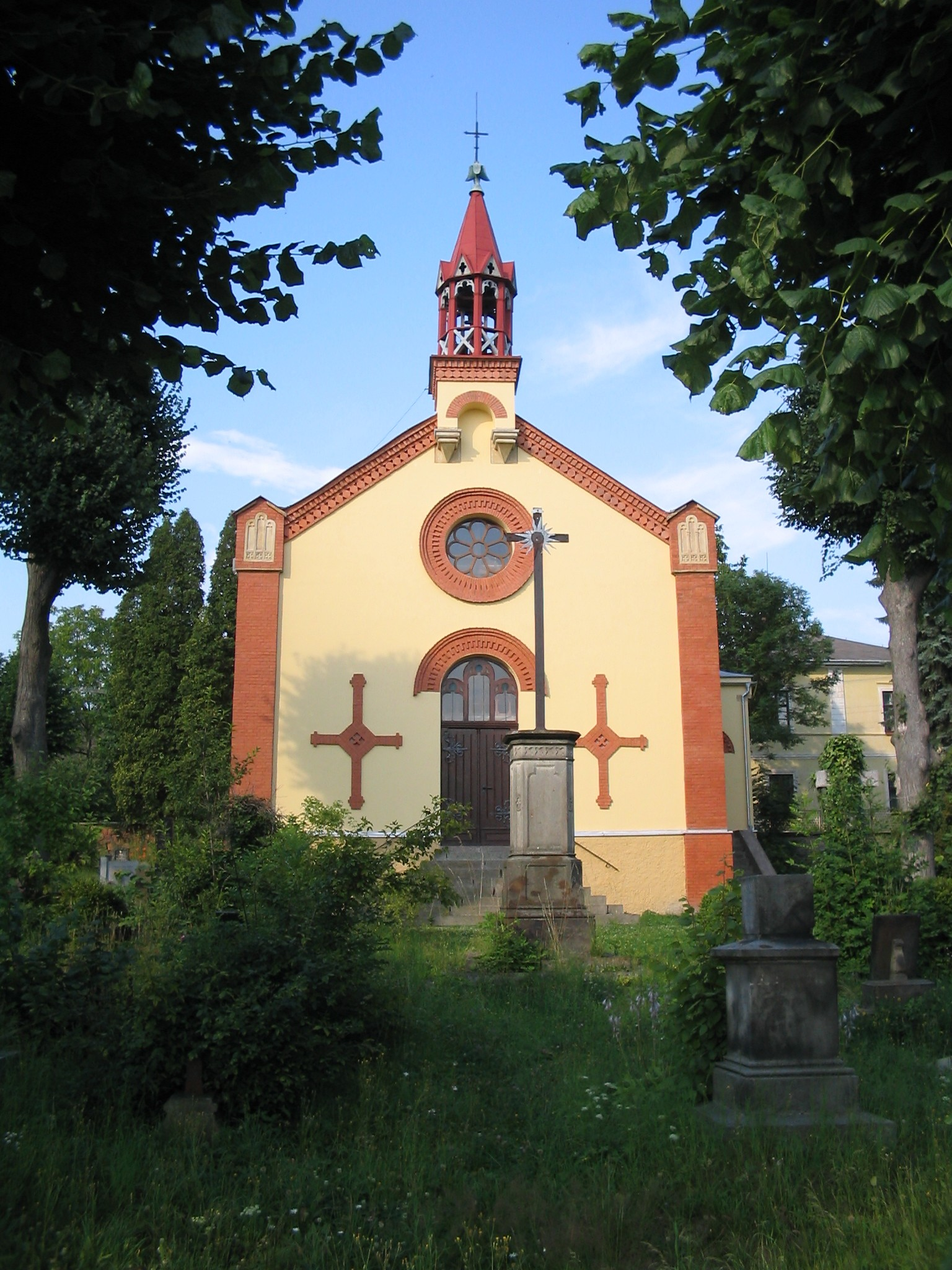 Šonovský kostel ČCE po poslední rekonstrukci a hřbitov.